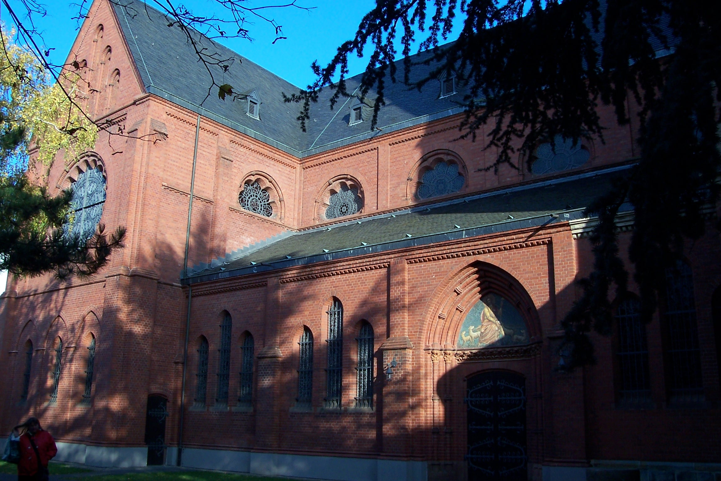 Süd-West-Ansicht der Pfarrkirche St. Sebastian (Bonn-Poppelsdorf)